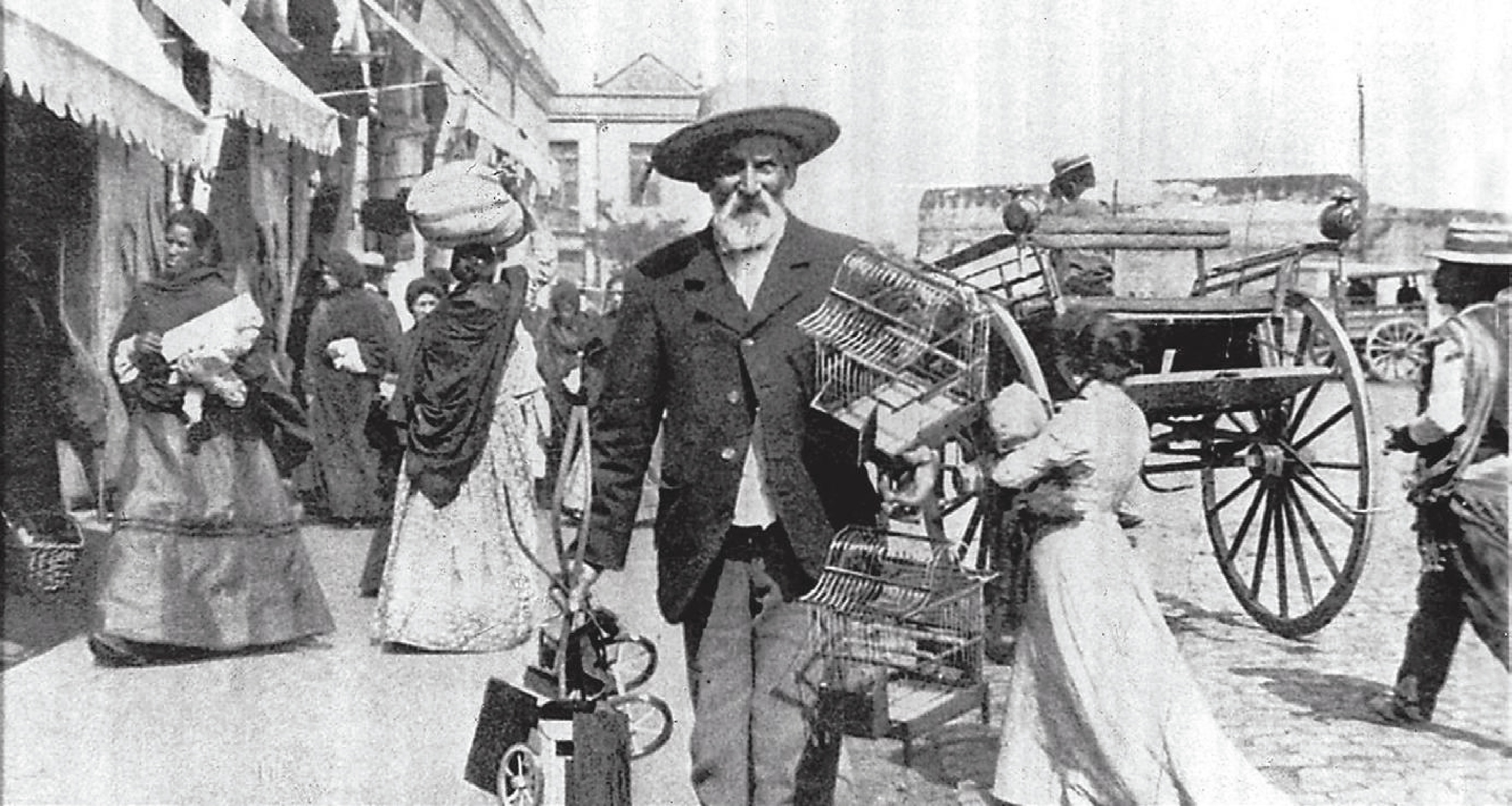 Vendedor ambulante en Chile, inicios siglo XX.